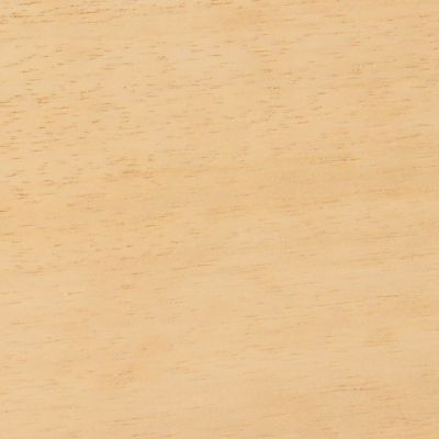 Abachi faanyag metszete